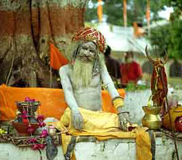 Photo de sâdhu dans le temple d'Ujjian